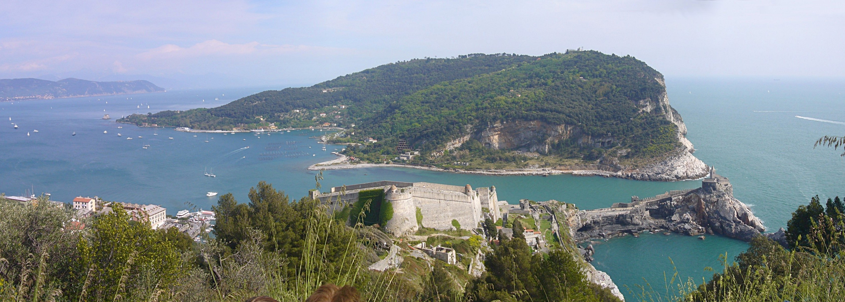 Arrivando a piedi a Portovenere, la spettacolare visione del golfo e dell'isola Palmaria!